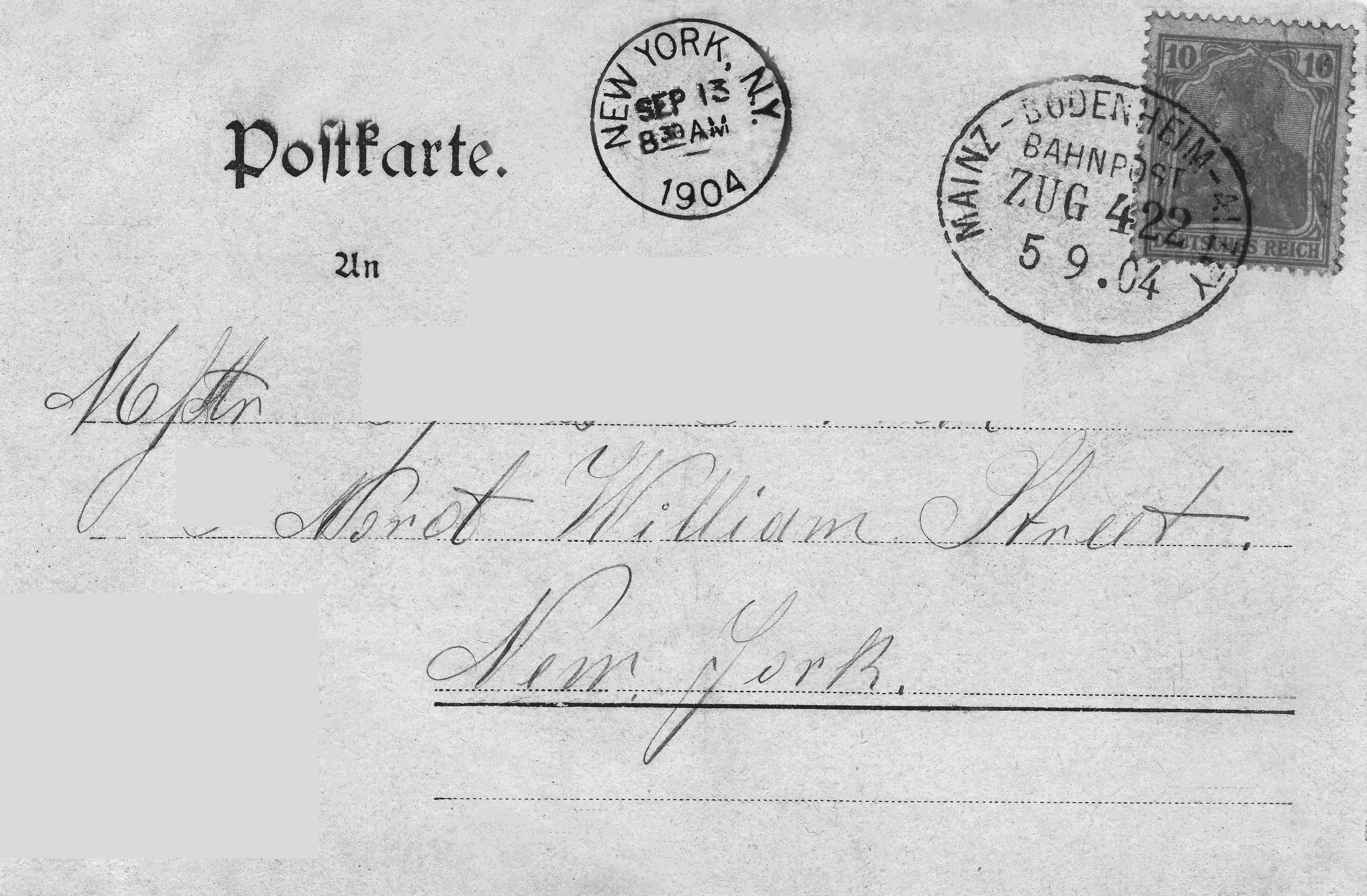 Postkarte mit Bahnpostbeförderung auf der Strecke Amiche nach New York in 8 Tagen